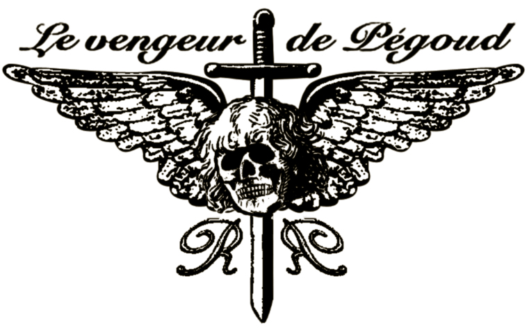 Écusson "Le vengeur de Pégoud" RR - Roger Ronserail